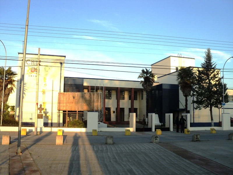 Entrada principal del Liceo Bicentenario Valentín Letelier de Linares